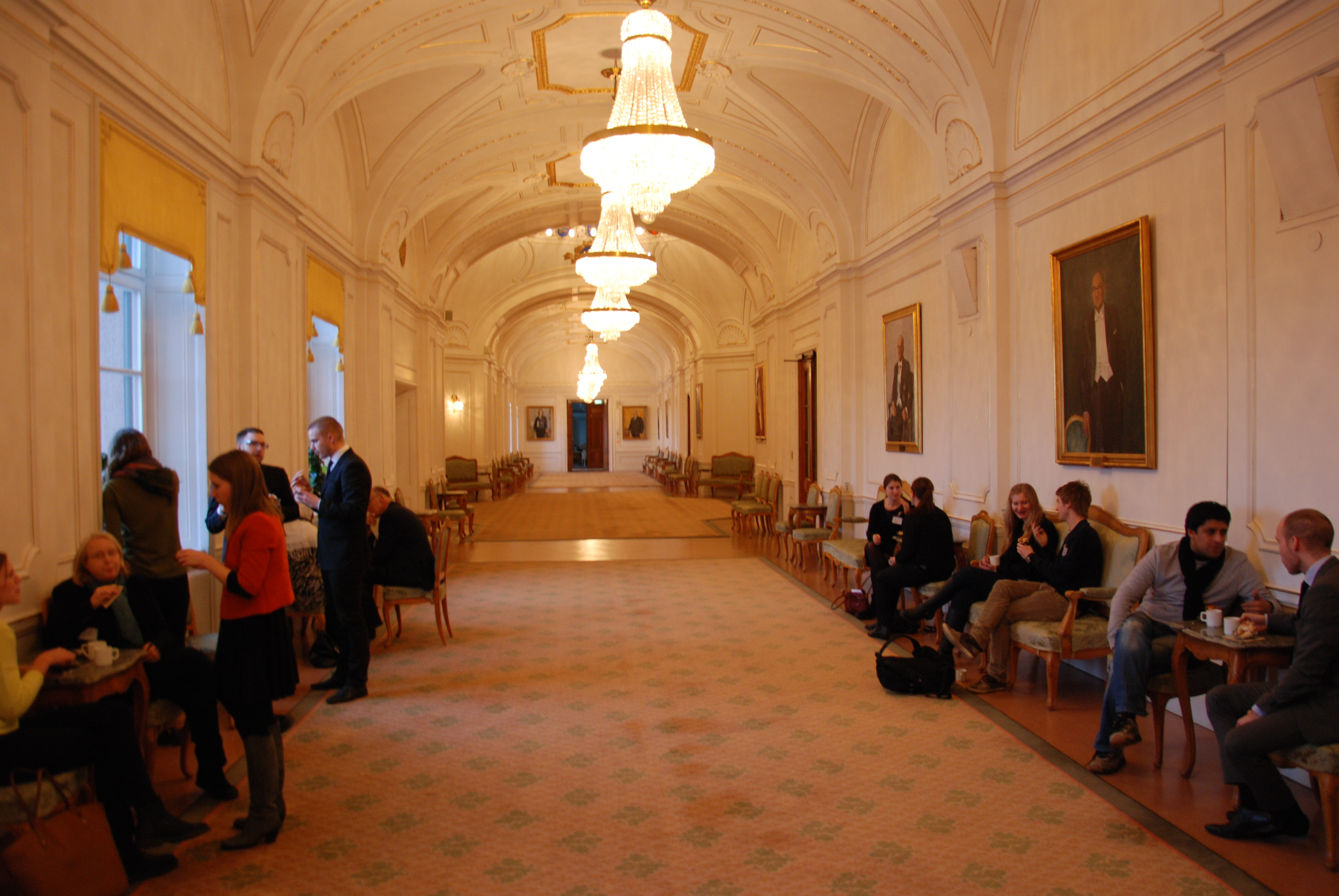 Swedish Parliament: old parilament buiding from ca 1900. "The linkage room" between the two plenary session halls. Unknown